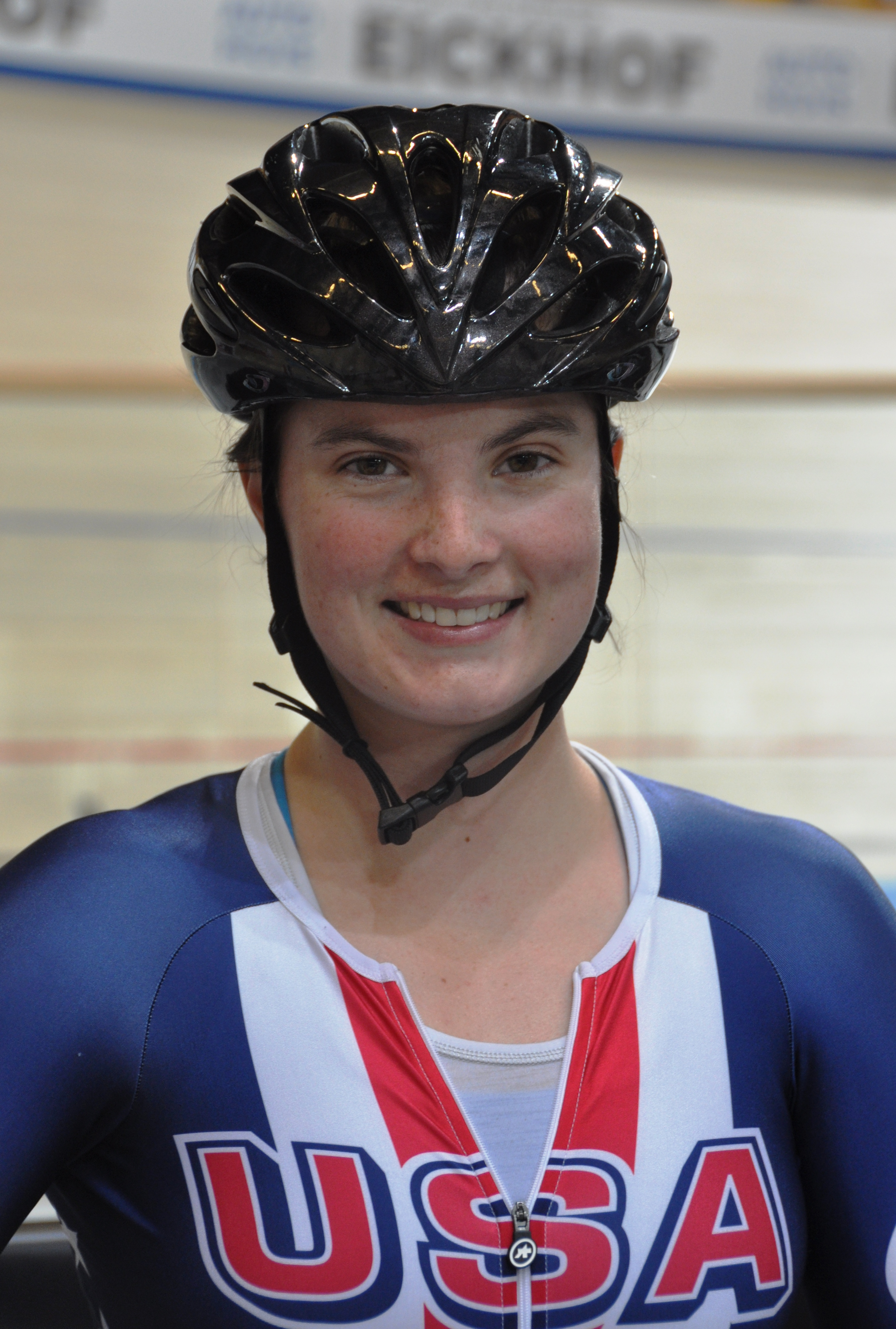 Madalyn Godby, Radsportlerin aus den USA